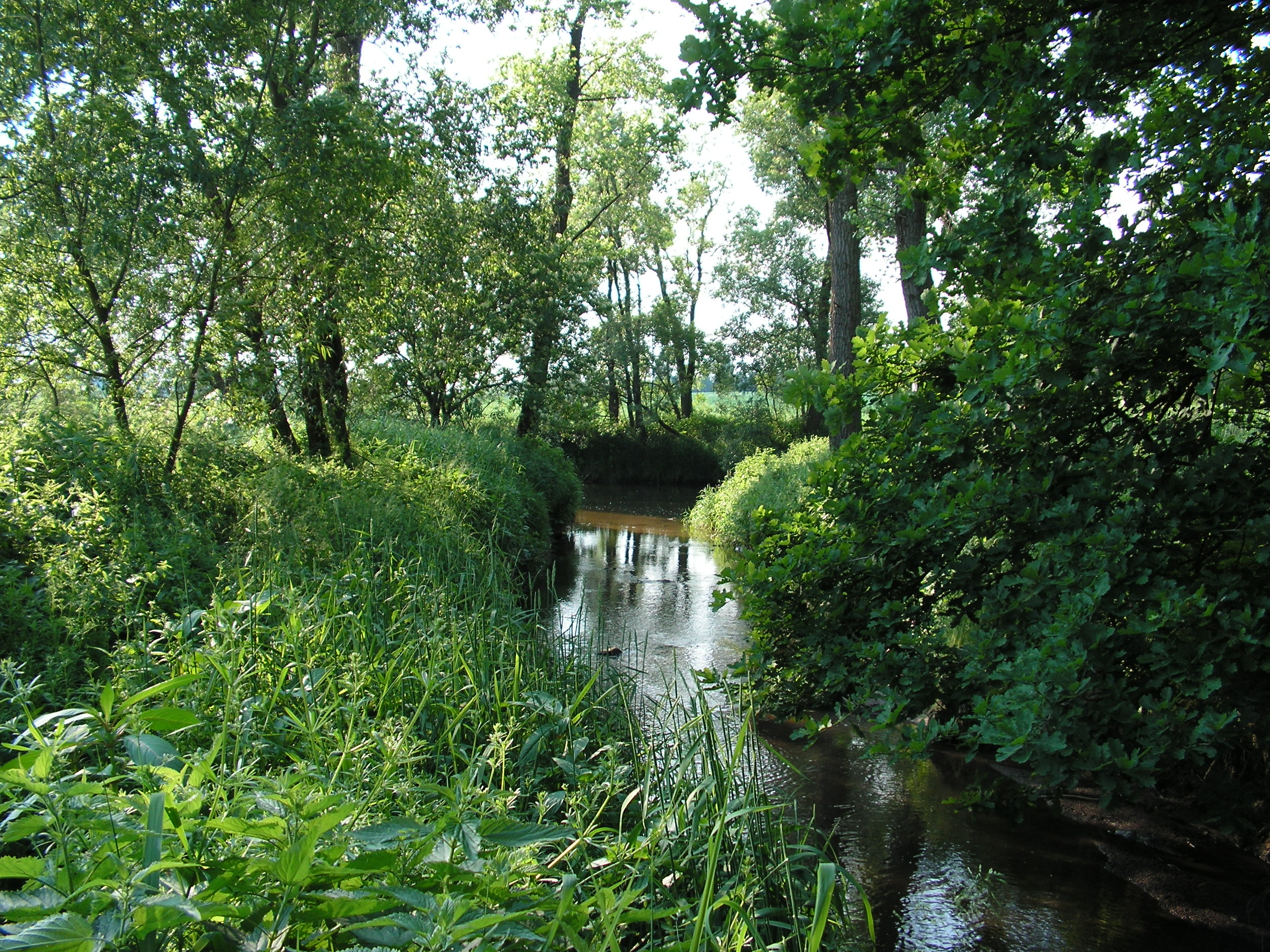 Ústí Úsobského potoka do Sázavy mezi Klanečnou a Horním Chlístovem v okrese Havlíčkův Brod